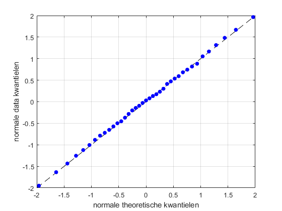 Een Q-Q plot waar op de horizontale as de kwantielen van een standaardnormale verdeling is weergegeven en op de verticale as de kwantielen van een dataset. De punten liggen rond de lijn y=x en zodoende zal de data waarschijnlijk uit deze verdeling komen.